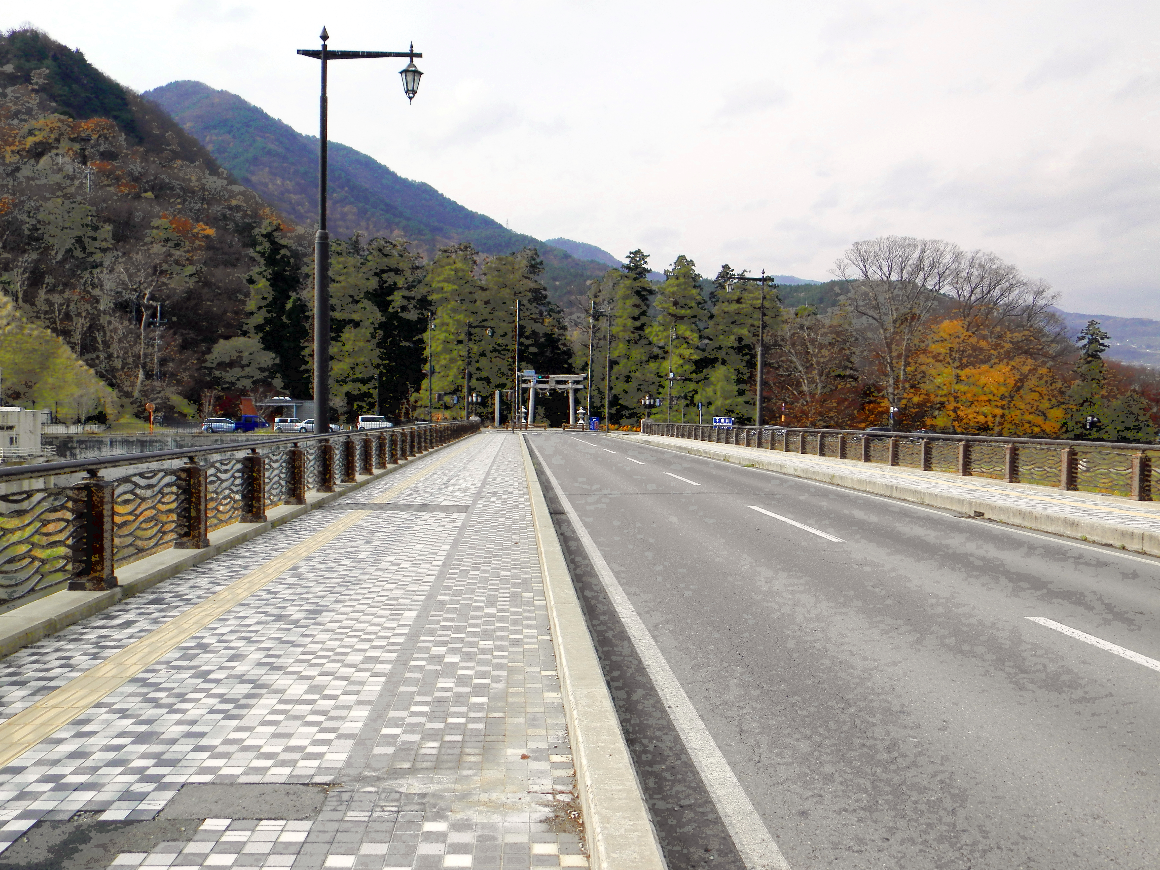 千曲川に架かる大正橋。橋の上から更級神社方向を観る。